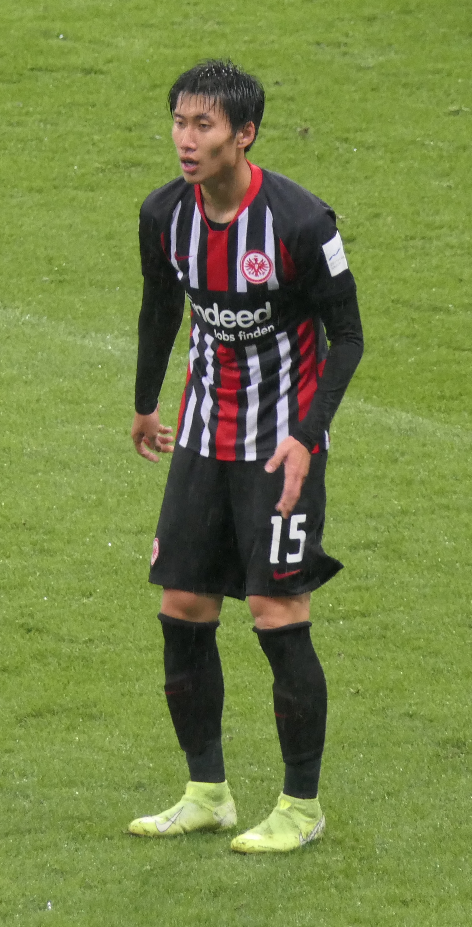 Der Fussballprofi Daichi Kamada im Trikot von Eintracht Frankfurt beim Heimspiel gegen den SV Werder Bremen am 06.10.2019.